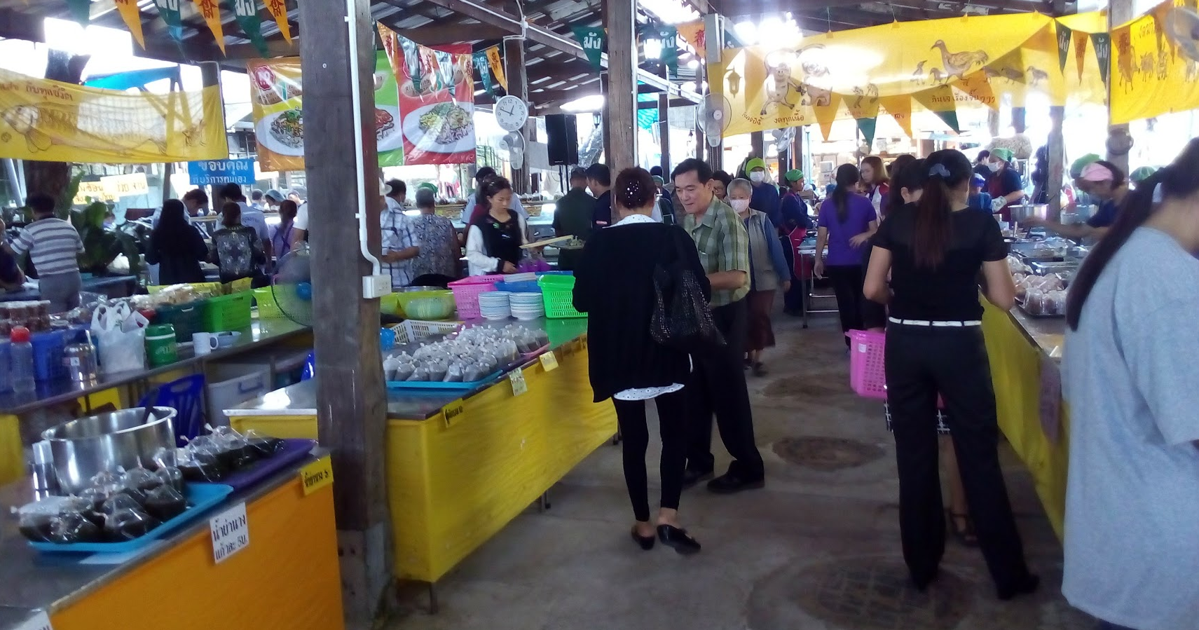 Вегетарійський фестиваль в місті Убон Ратчатані